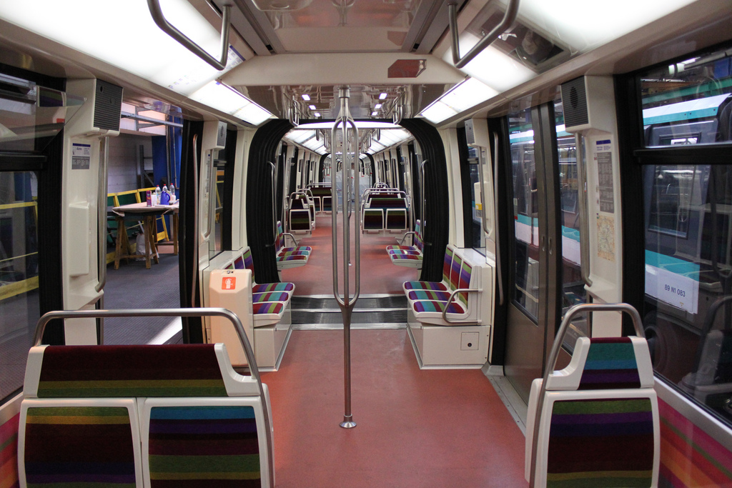 Aménagement intérieur d'un train MP 05 sur la ligne 1 du métro de Paris.